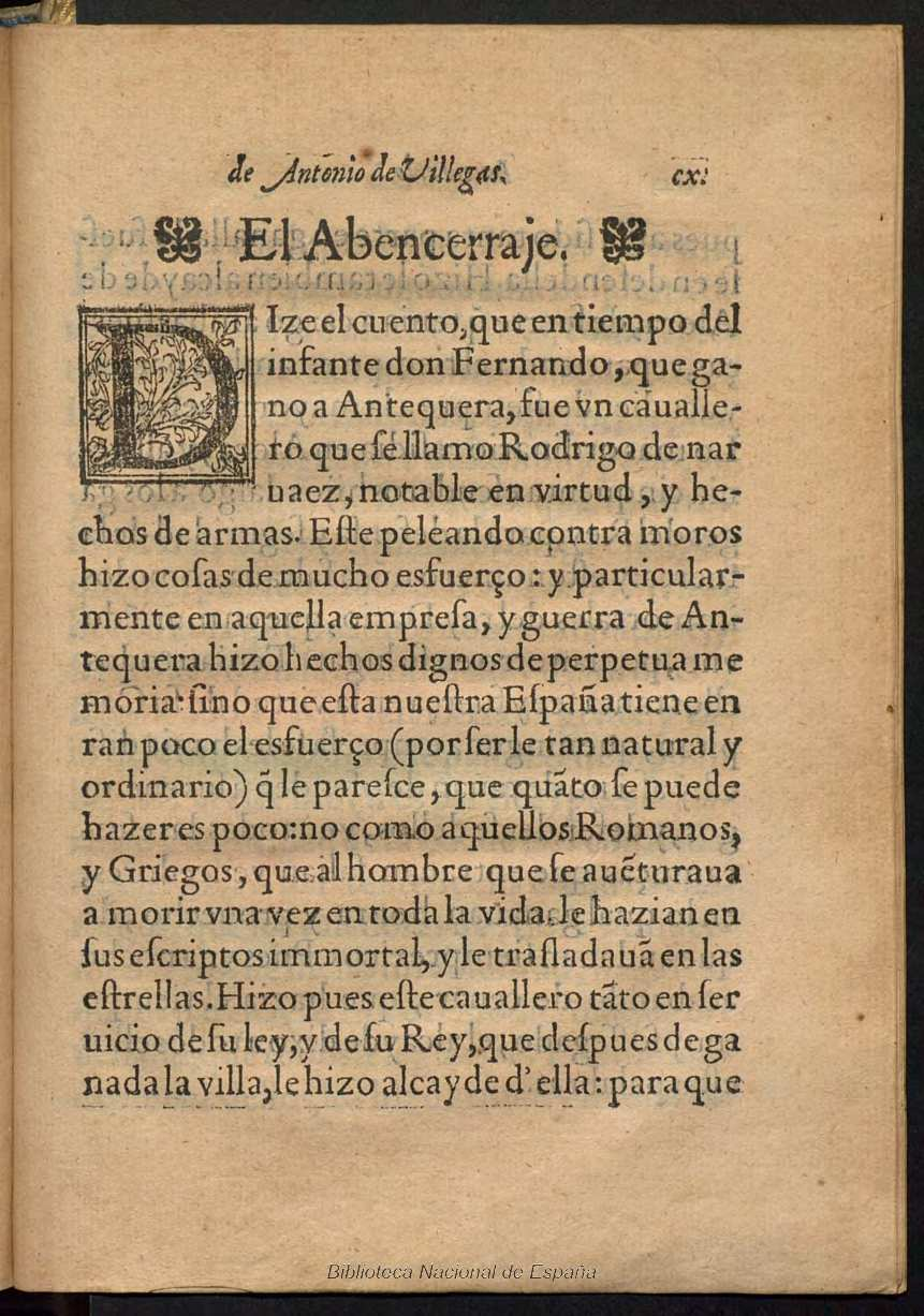 El Abencerraje (pág. 233) del libro de Antonio de Villegas en 1565 Título: Inventario, de Antonio de Villegas, dirigido a la Magestad Real del Rey Don Phelippe, nuestro señor Autor: Villegas, Antonio de (fl. 1551-1577), Canto, Francisco del (fl. 1551-1590) - impresor, Canto, Mateo del (fl. 1554-1568) - editor Fecha: 1565 Datos de edición: En Medina del Campo, impresso por Francisco del Canto